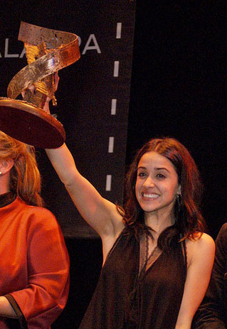 Macarena García con el premio CiBRA a mejor personaje adaptado por Blancanieves